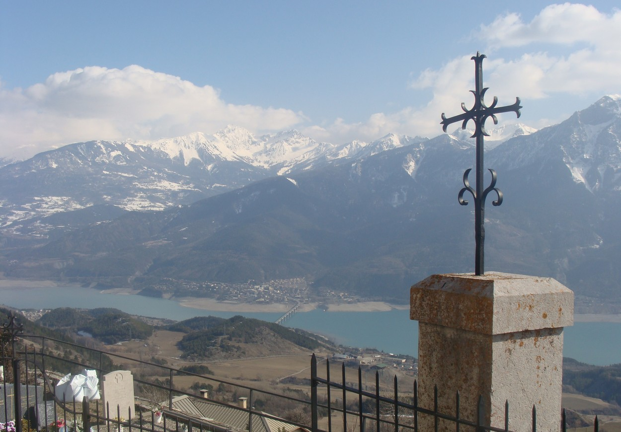 Vue depuis le cimetière de Saint-Apollinaire (Hautes-Alpes). En bas, Savines et le lac de Serre-Ponçon. Au fond, la chaîne du Parpaillon.